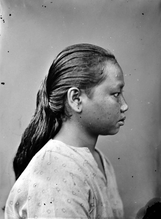 Negatief. Een Balantak vrouw, Centraal-Celebes